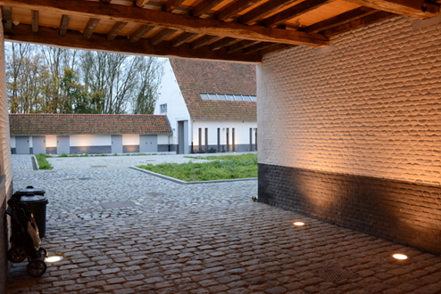 Foto van de inkom en de binnenkoer van de hoeve anno 2020